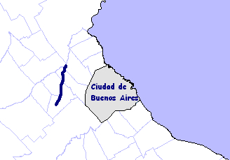 Mapa Arroyo Morón